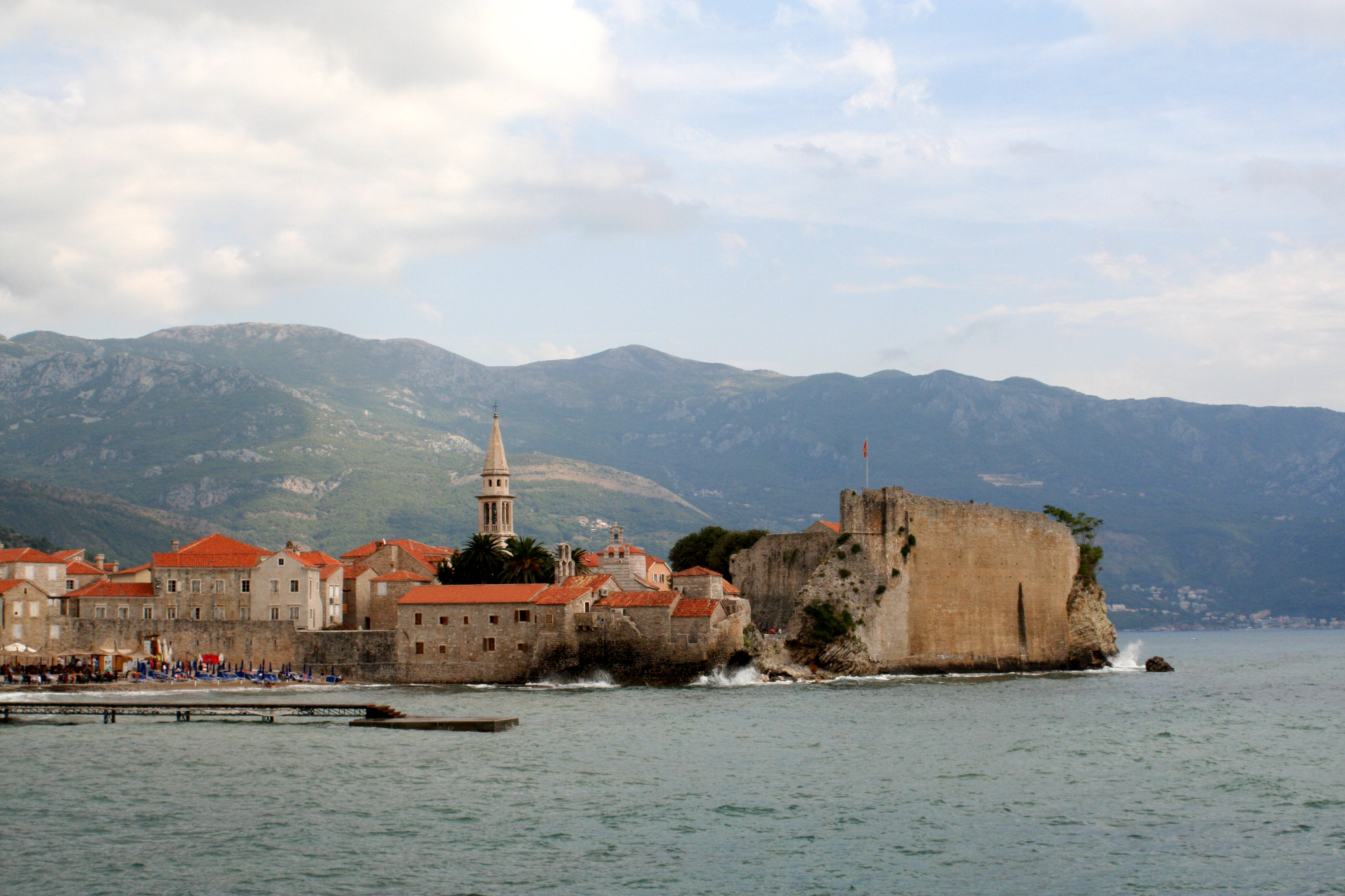 Widok na starą Budvę do strony morza - Budva to miejscowość turystyczna w Czarnogórze.Zdjęcie wykonano z przejścia wzdłuż klifu.